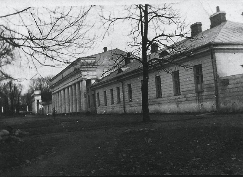 Беларуская (тарашкевіца): Сьвіслач (Śvisłač), пляц Гімназічны (plac Gimnazičny) або Рынак (plac Rynak). Сьвіслацкая гімназія